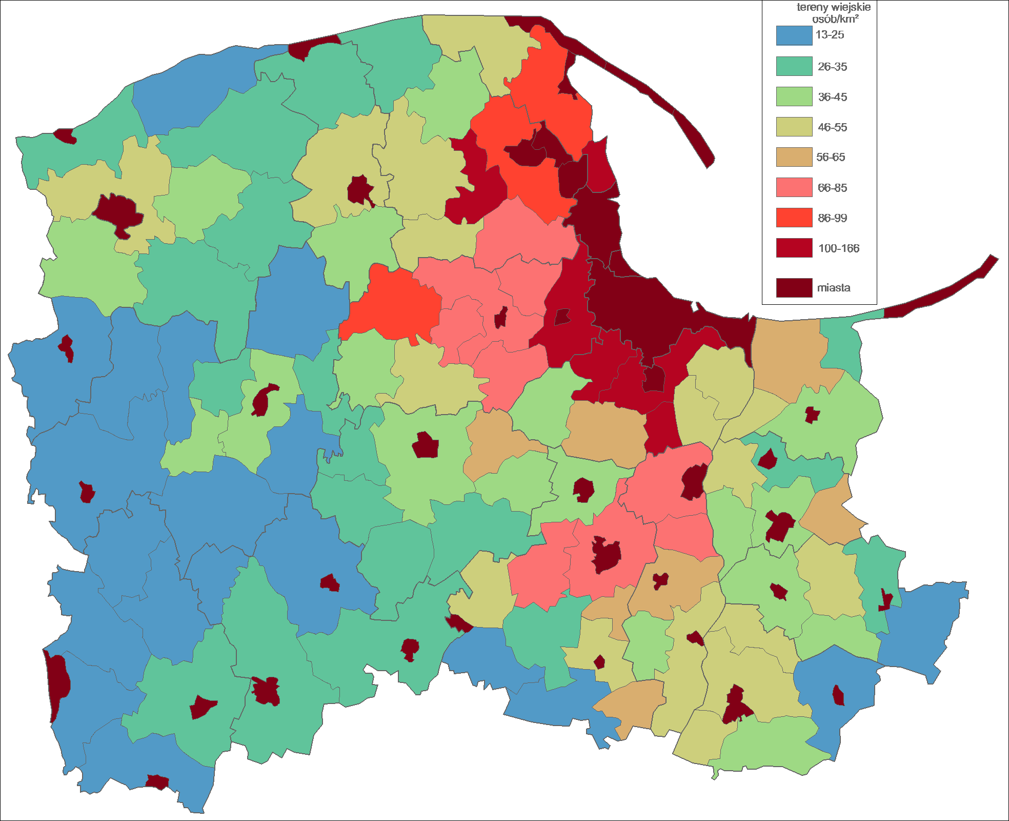 Województwo pomorskie. Opracowanie własne Bogomolov.PL . Dane na podstawie GUS, stan 31 XII 2006.